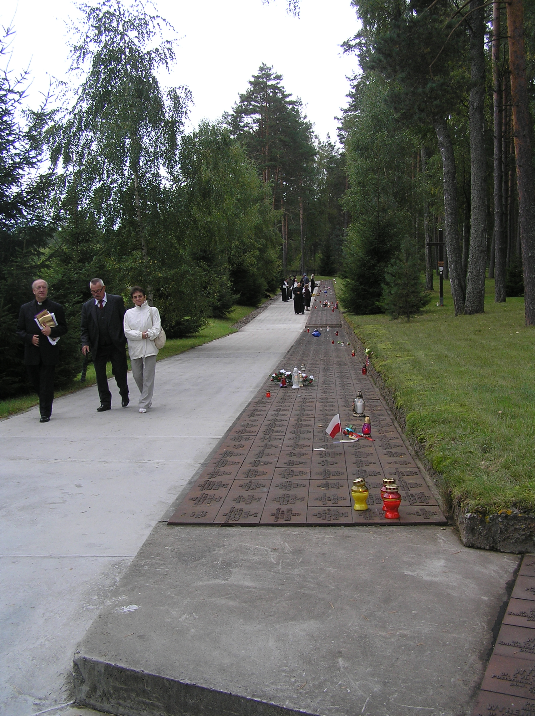 Tablice upamiętniające pochowanych na Polskim Cmentarzu Wojennym w Miednoje